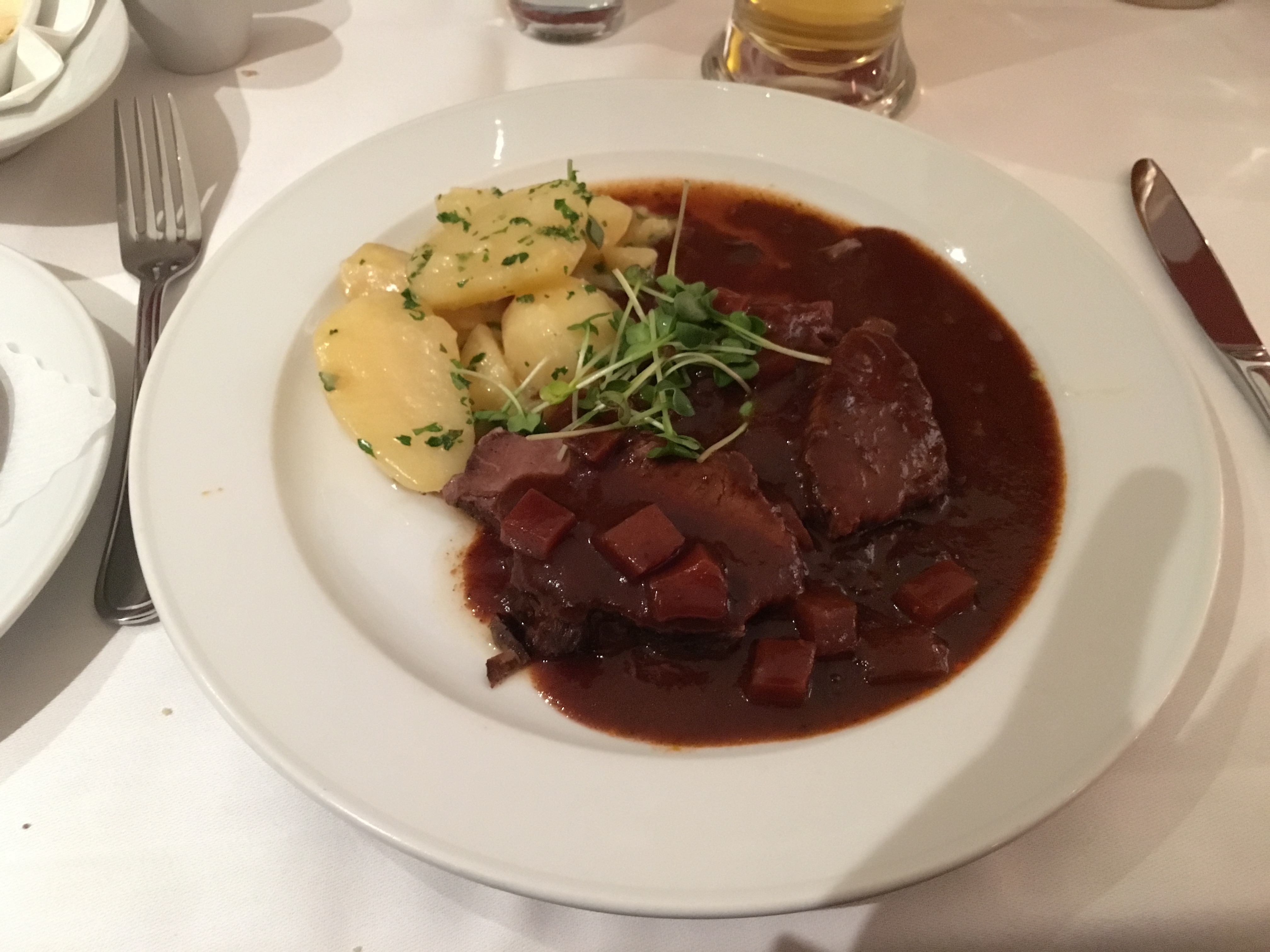 Böfflamott mit Kartoffeln